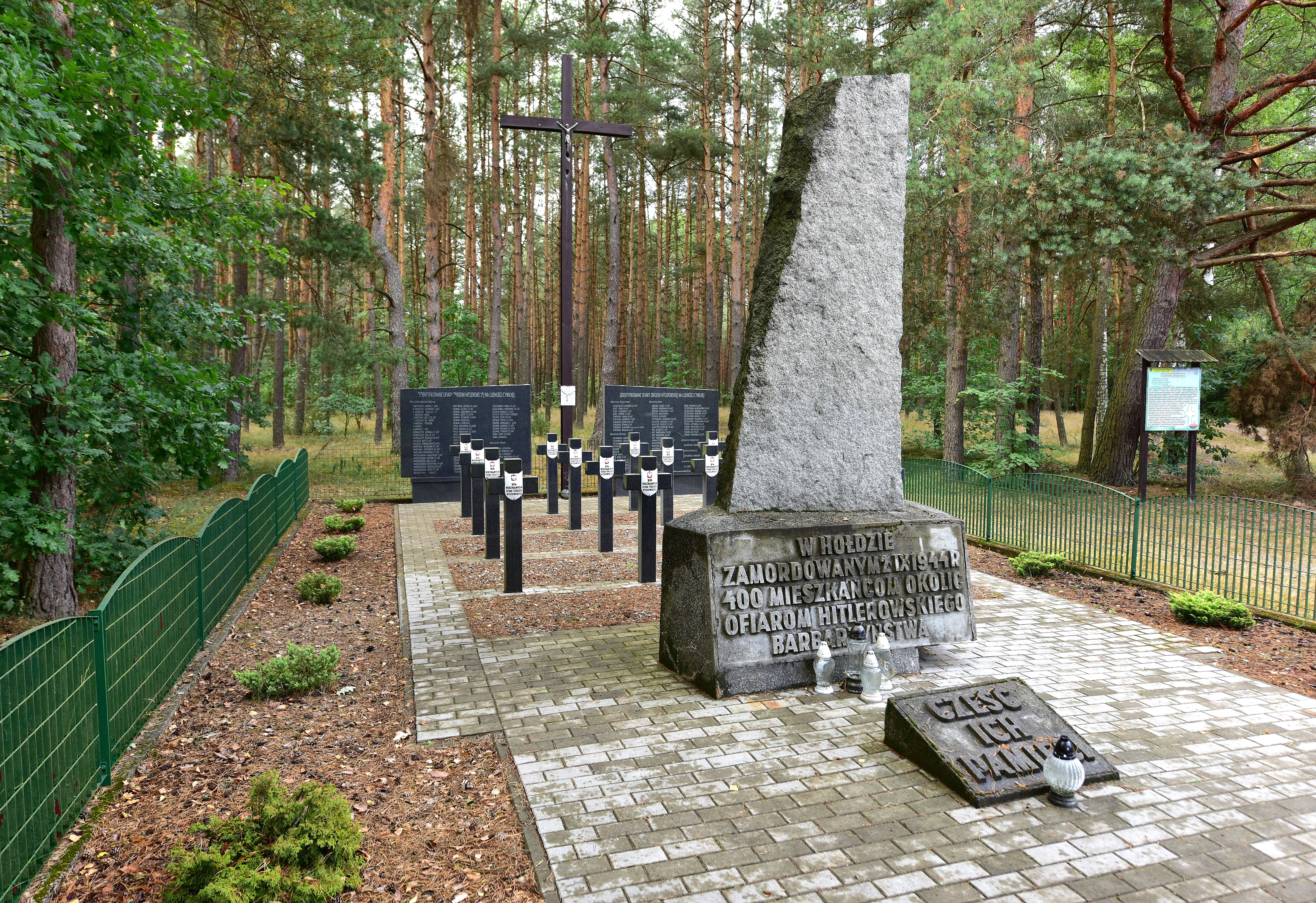 Upamiętnienie pacyfikacji wsi Lipniak-Majorat